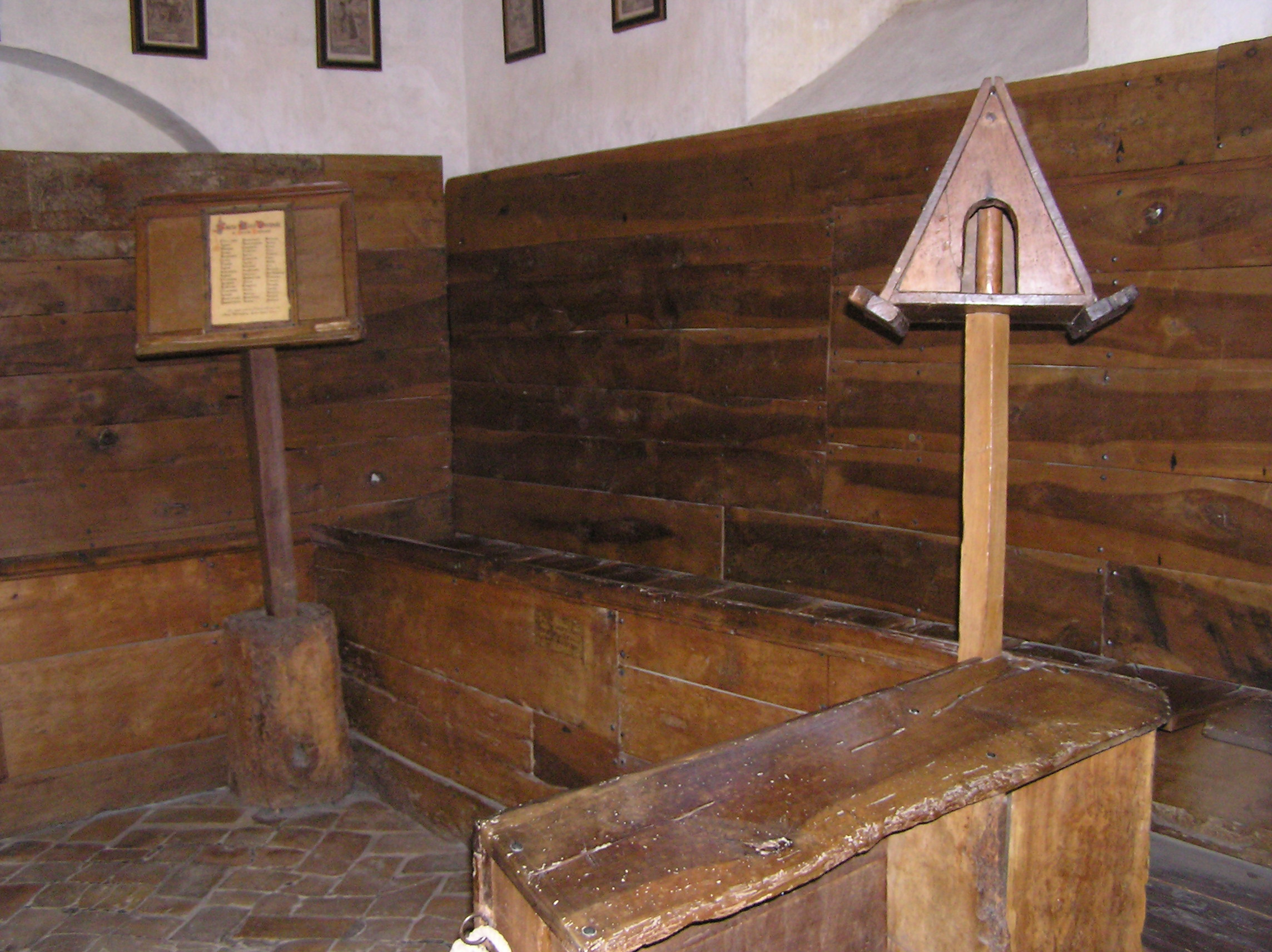 San Damiano, Assisi, Choir